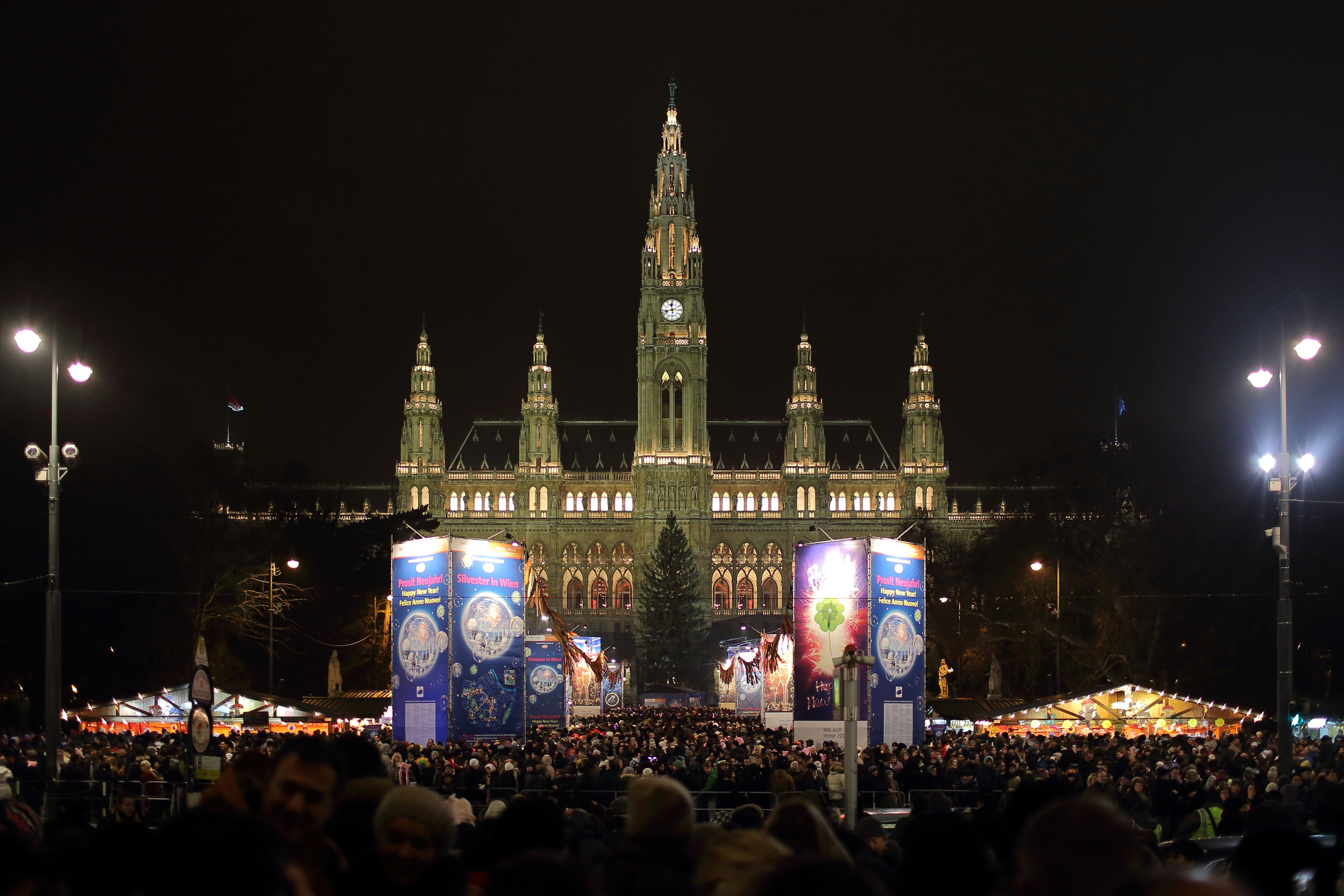 Der Wiener Silvesterpfad 2013/14 im Bereich des Rathausplatzes.